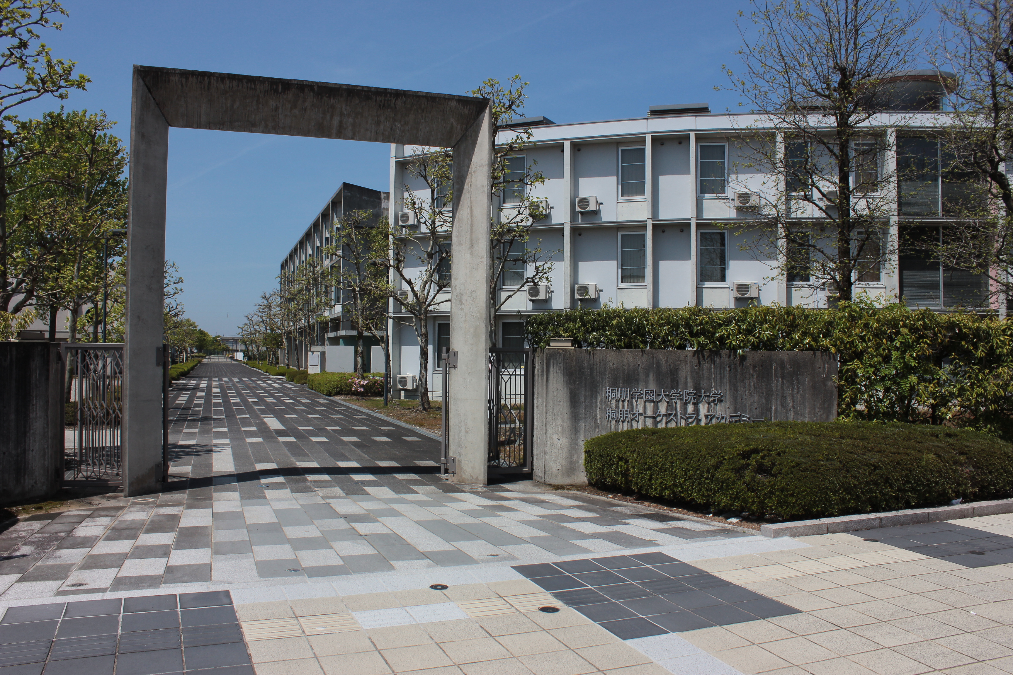 桐朋学園大学院大学 Canon EOS Kiss X5